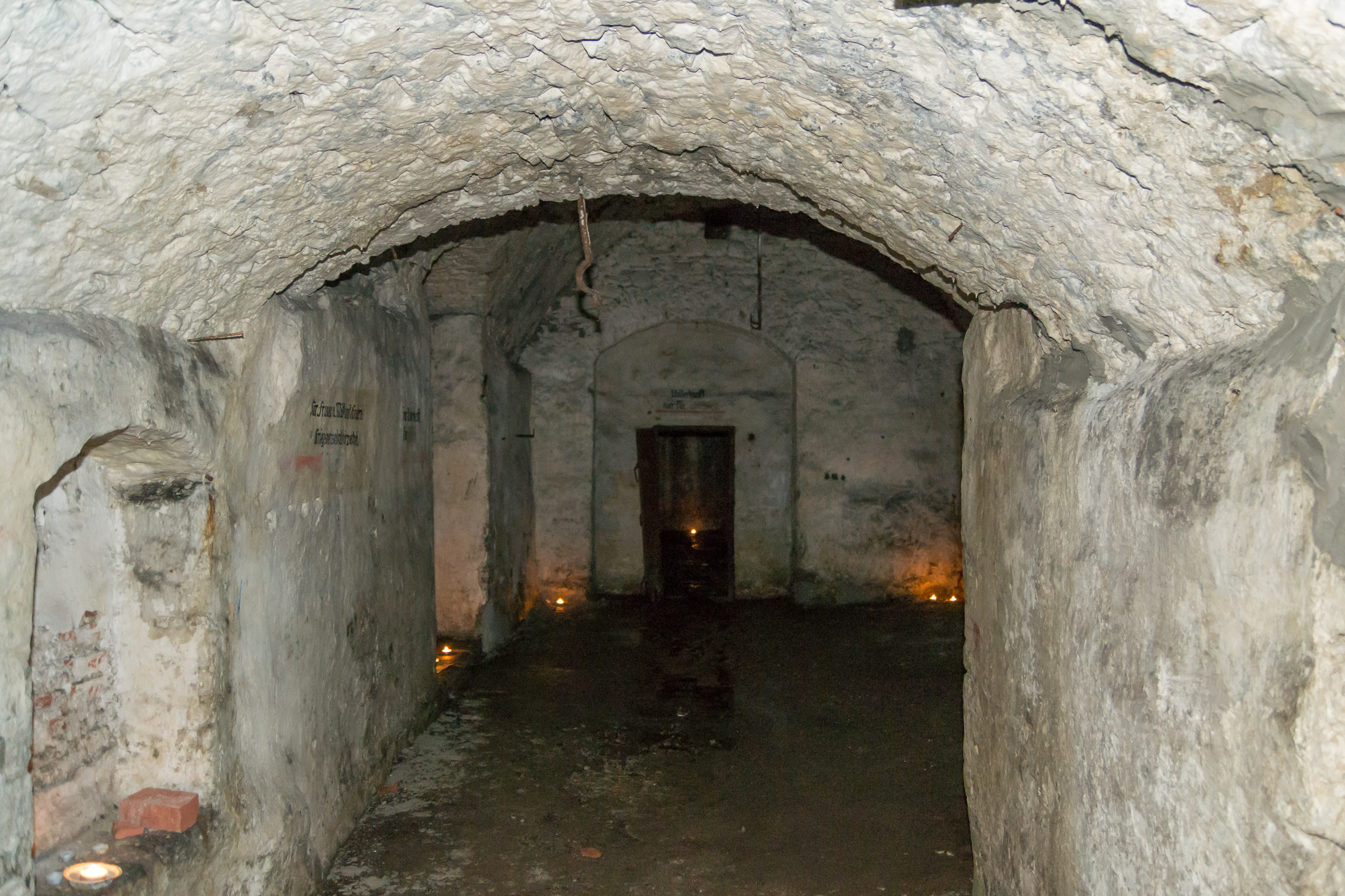 This image shows a heritage building in Germany, located in the North Rhine-Westphalian city Detmold (no. 145). Ehemalige Brauerei Falkenkrug, heute Waldorfschule. Der Eiskeller befindet sich etwa 10 Meter unter der Erdoberfläche und liegt nur teilweise unterhalb des Gebäudes. Er wurde nur wenige Jahre bis ca. 1919 genutzt; im Zweiten Weltkrieg diente er als Bunker, später wurde hier Müll abgeladen.